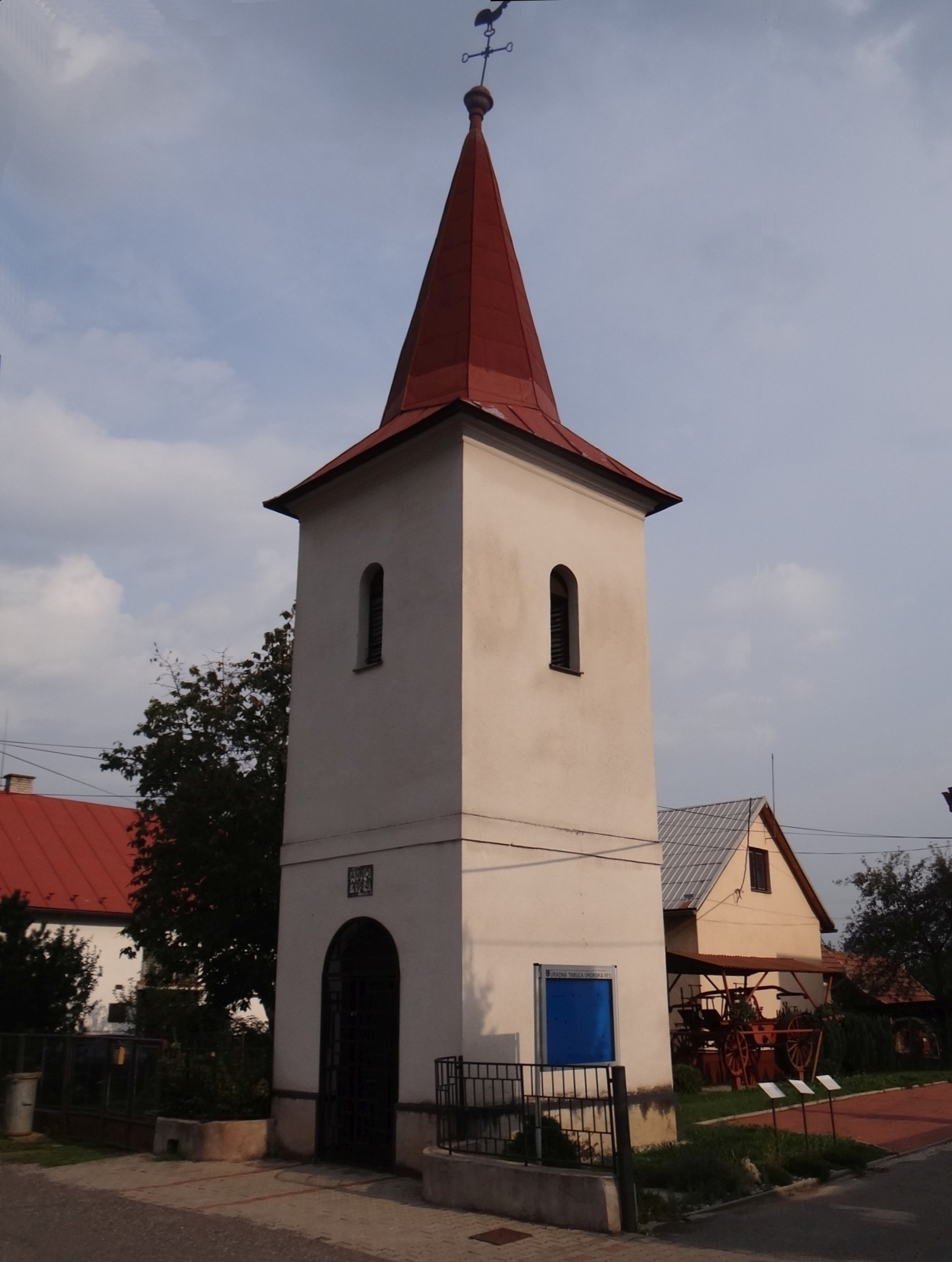 Uhorská Ves